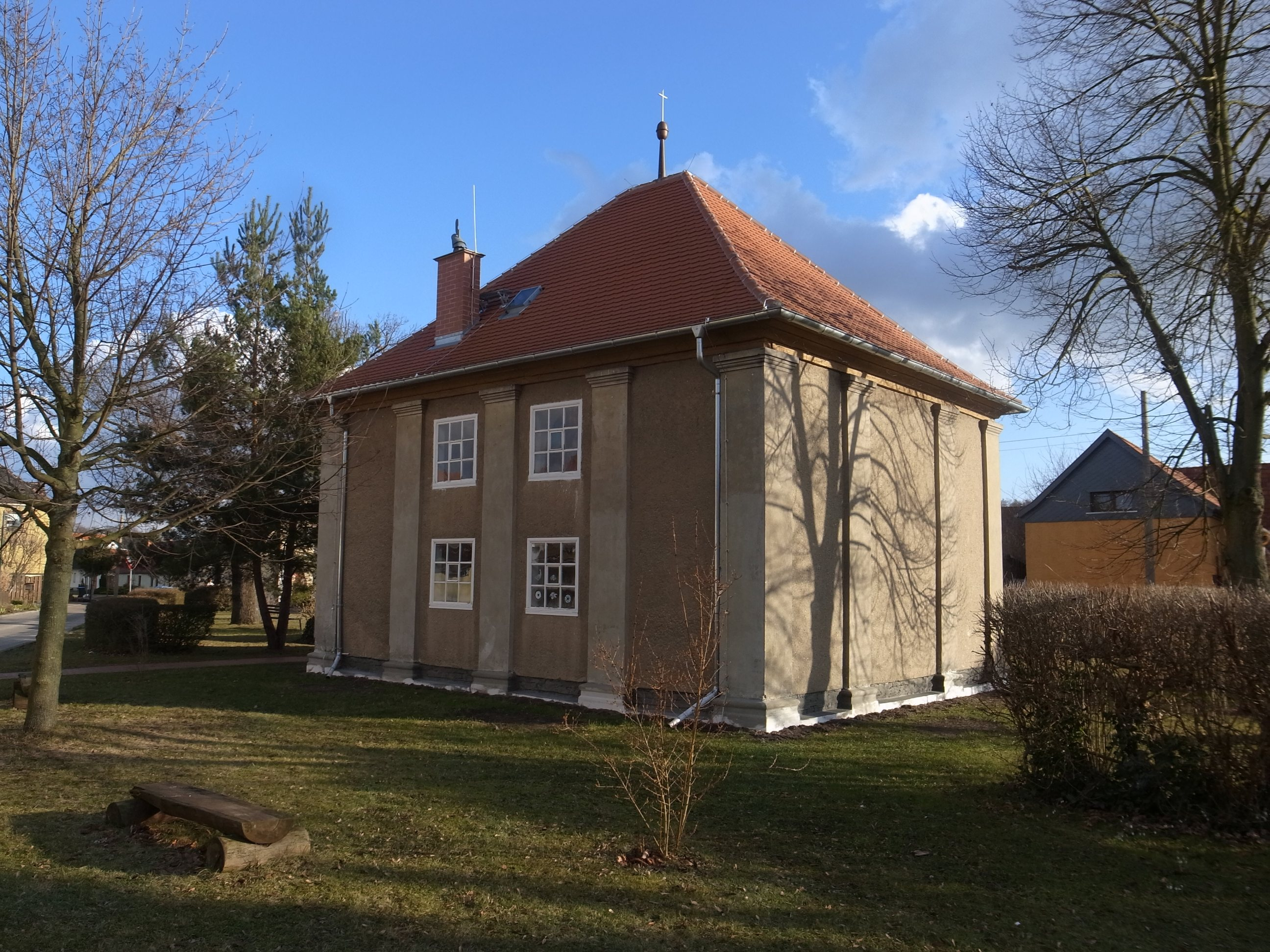 Chörau, Bethaus. Errichtet 1793